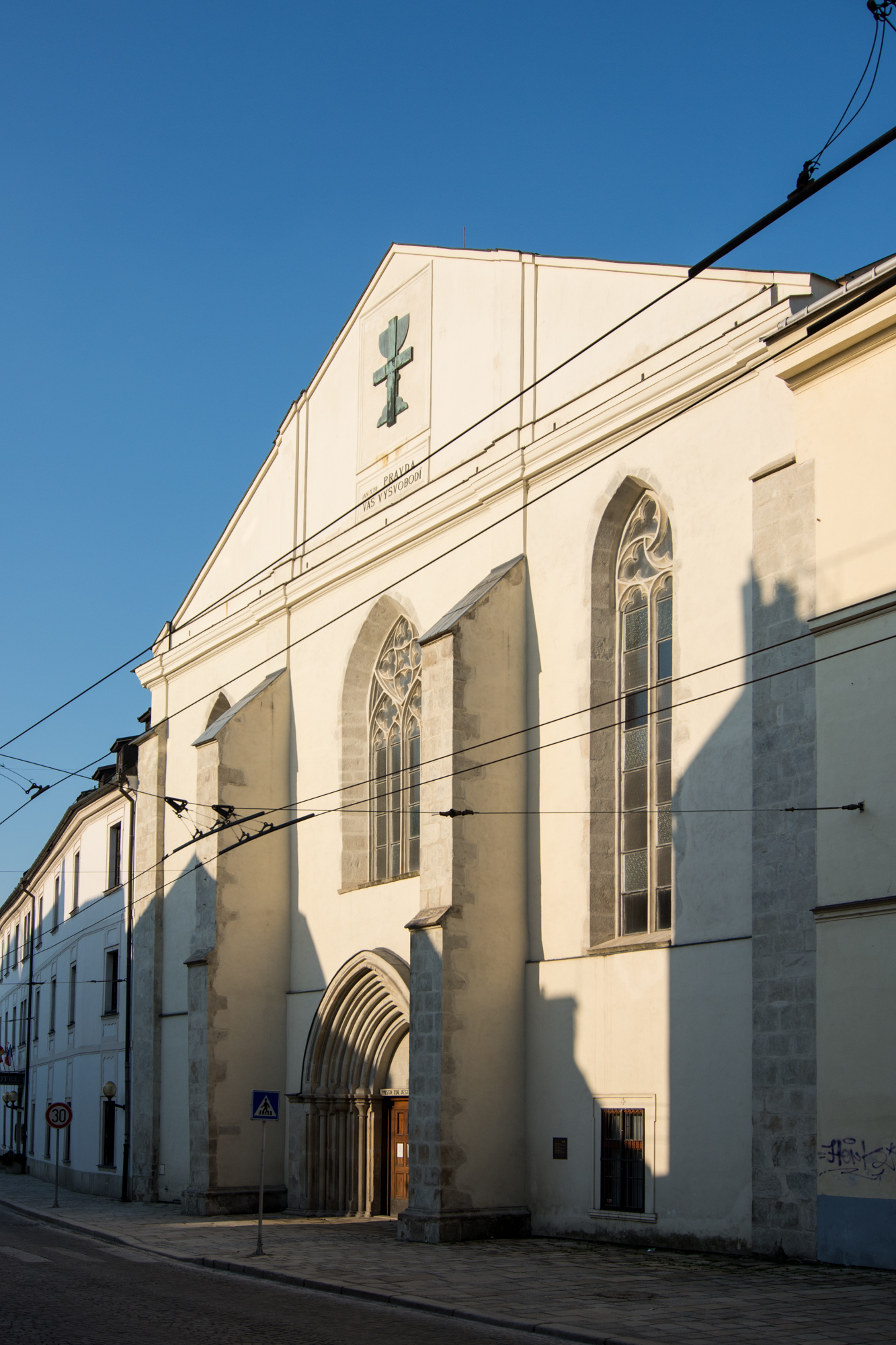 západní průčelí